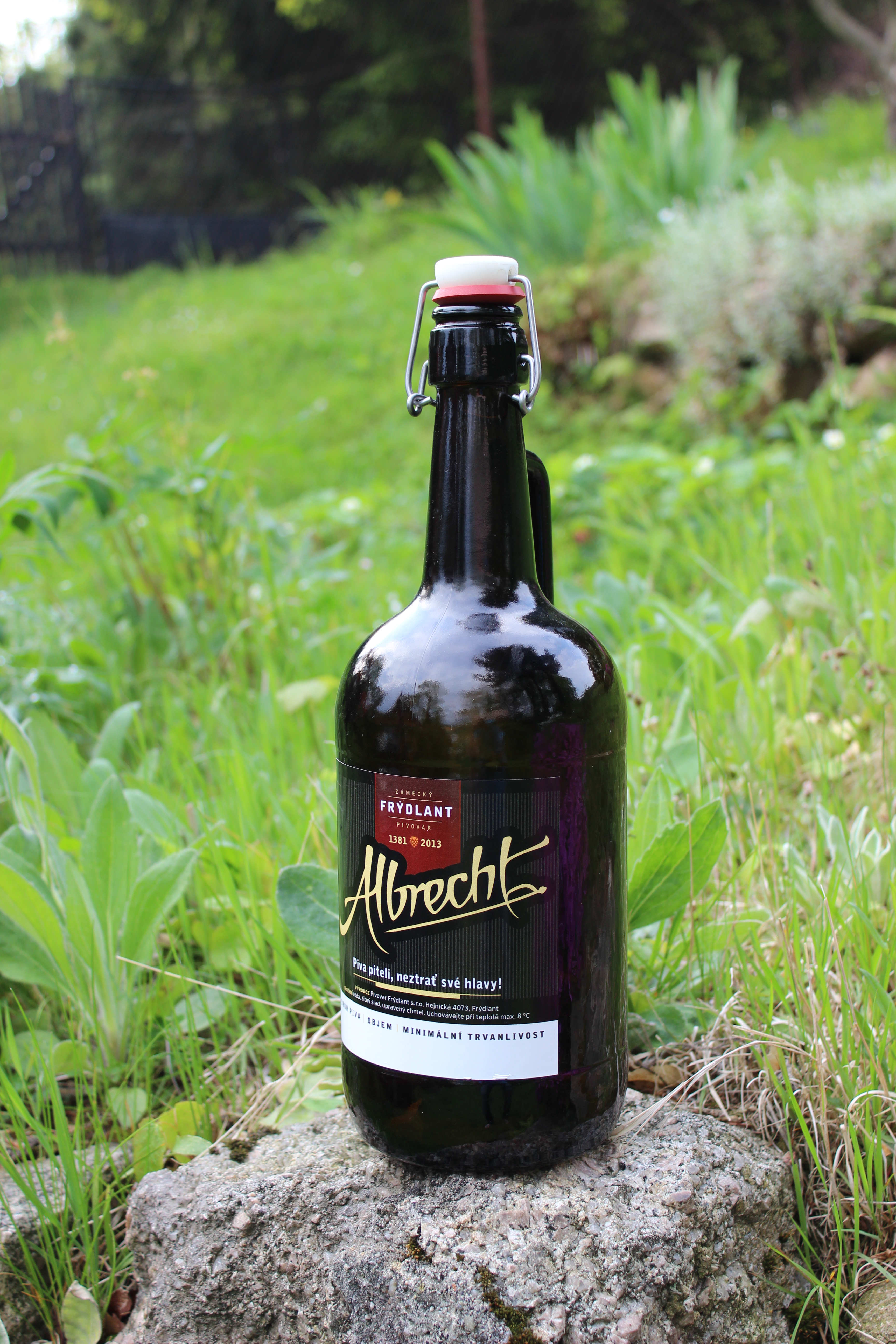 Láhev piva ze Zámeckého pivovaru Frýdlant.